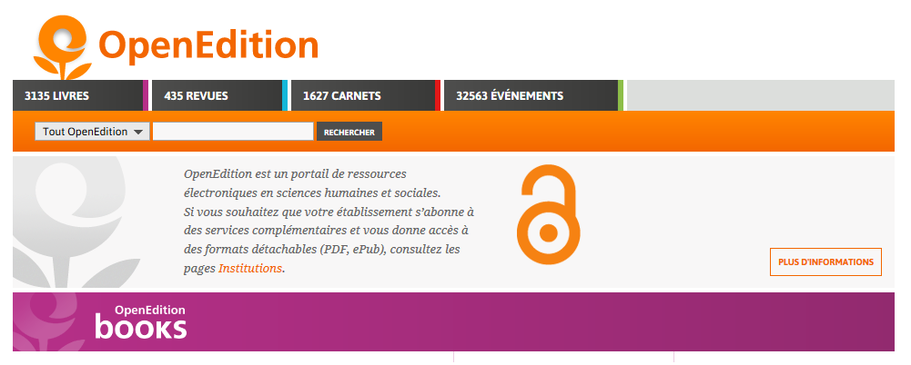 Captura de pantalla de la plataforma